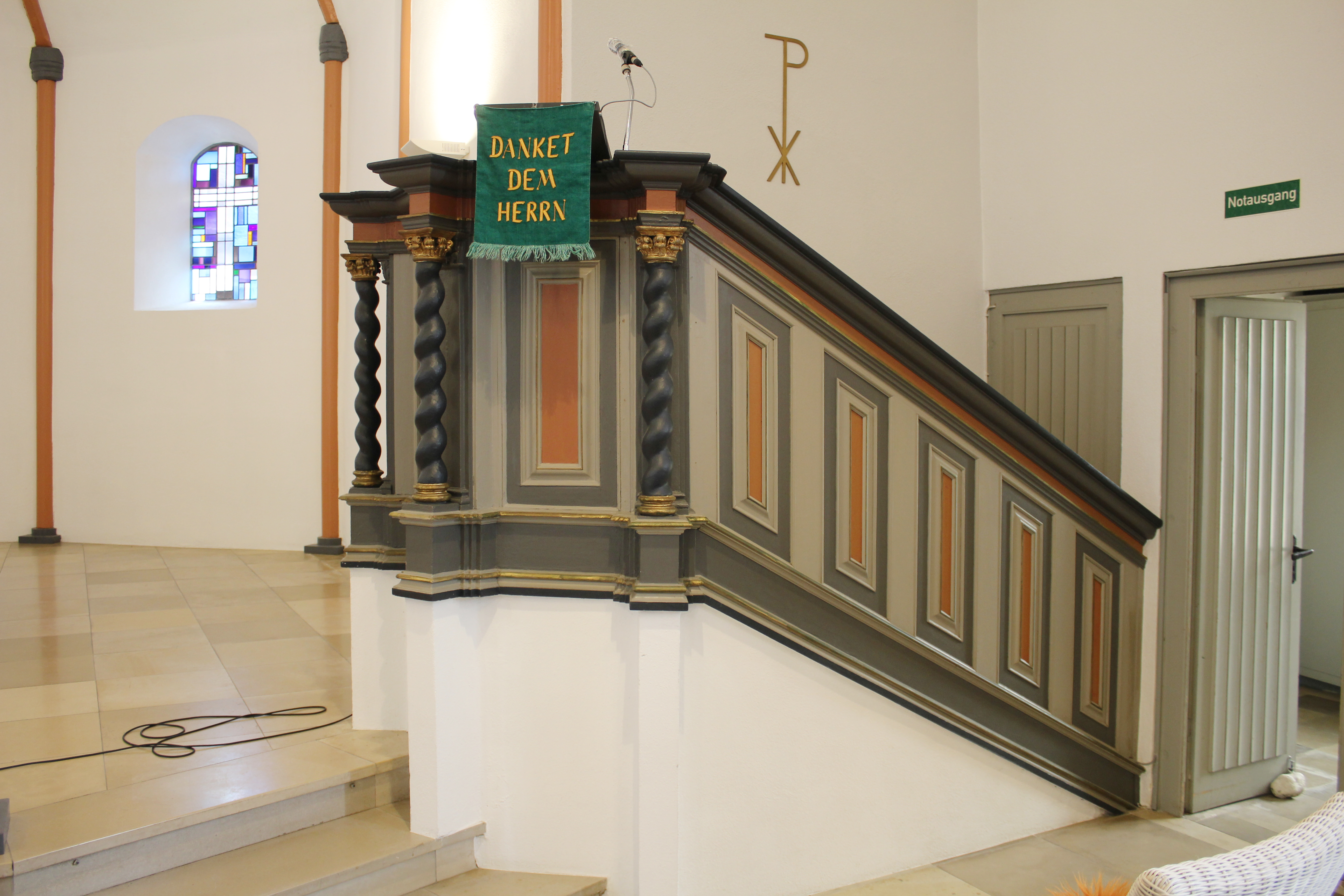 Evangelische Kirche Niederwetz, Gemeinde Schöffengrund, Hessen, Deutschland